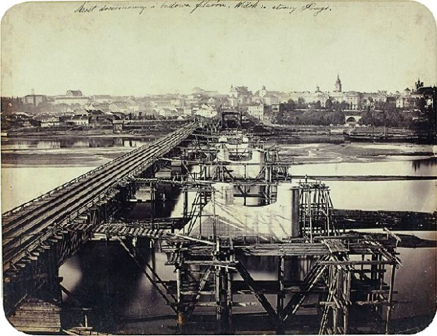 Warszawa, budowa mostu Kierbedzia, widok z Pragi